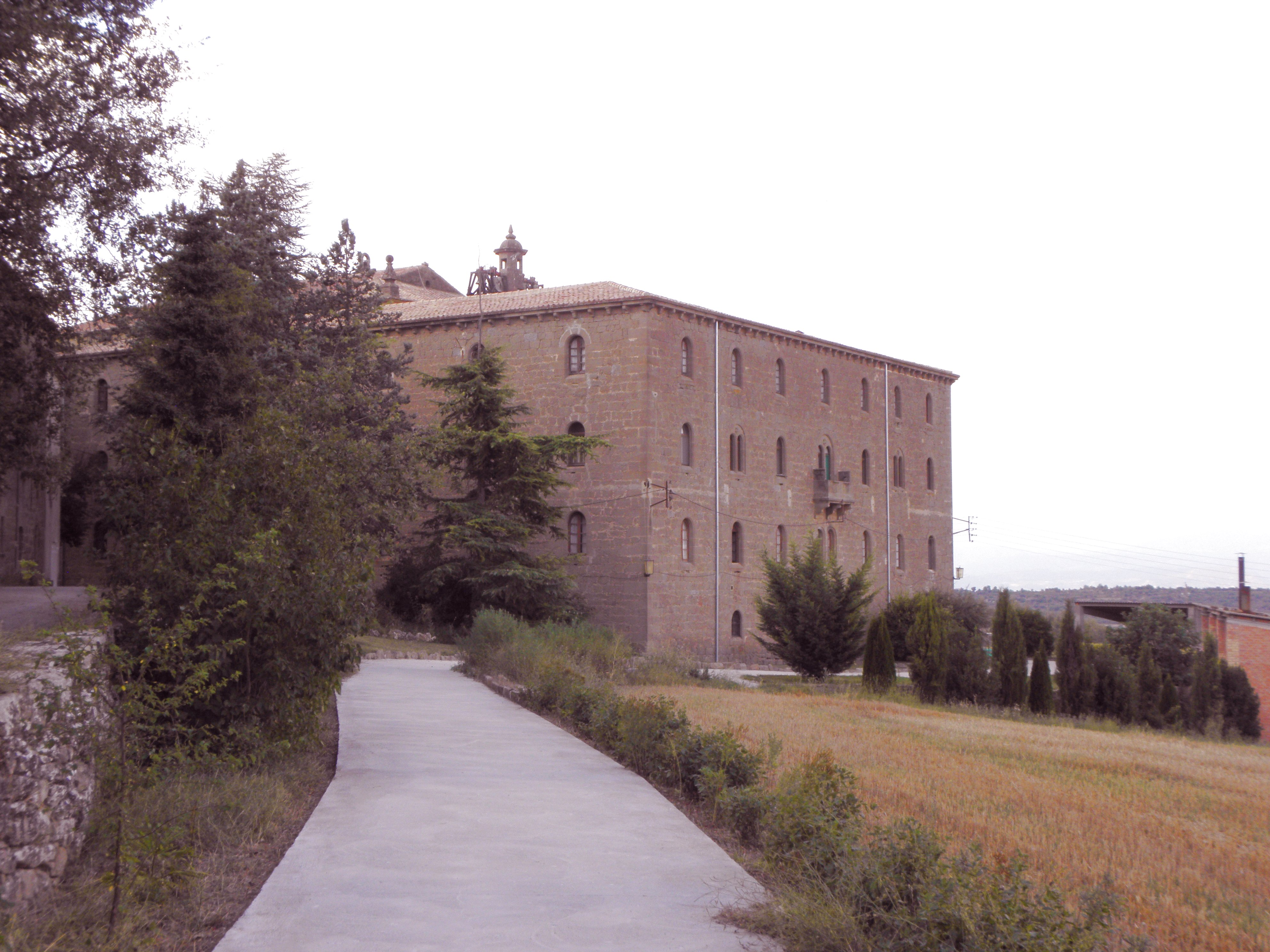 Les façanes sud (part esquerra de la imatge) i est (a la part dreta) del monestir del Miracle (Riner, Solsonès)